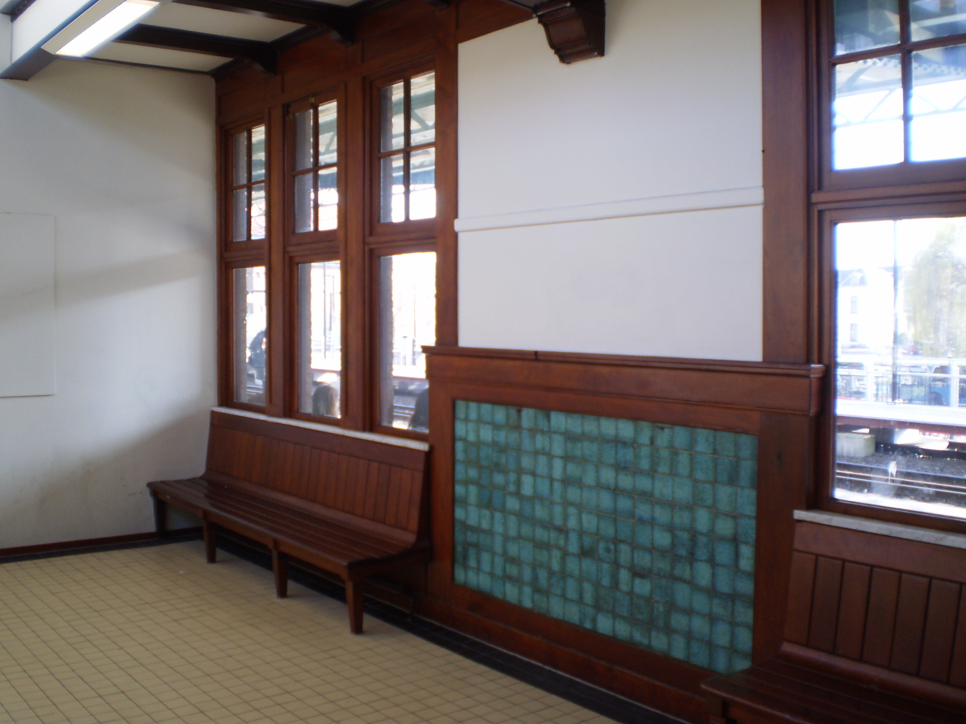 Deventer station, waiting room